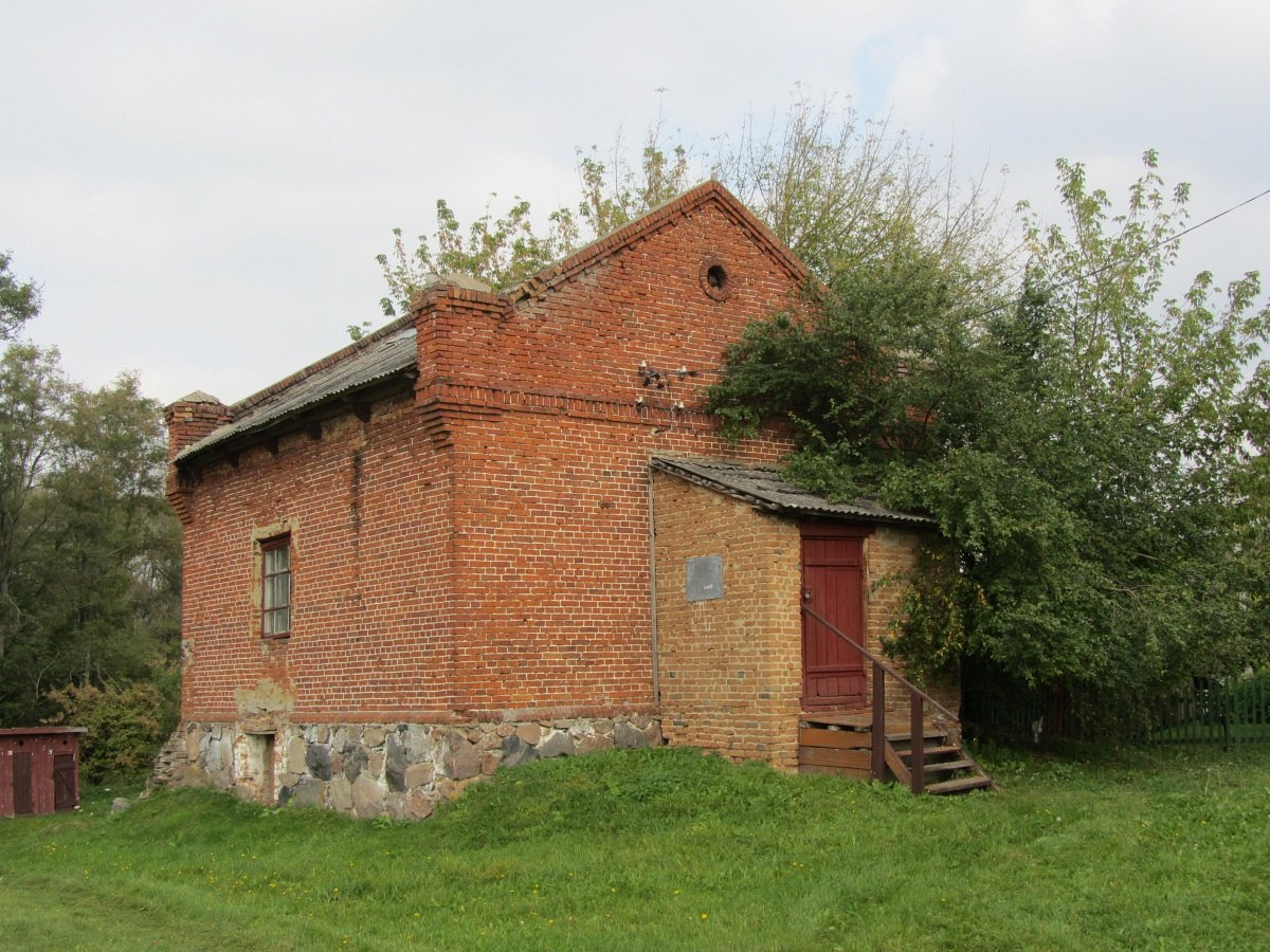 Агароднікі. Сядзіба